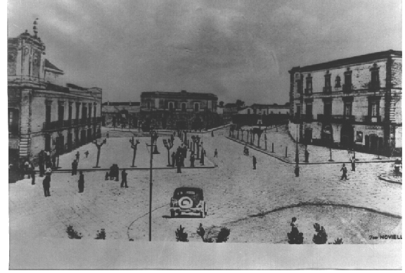 Foto di bitetto nei primi anni 1900